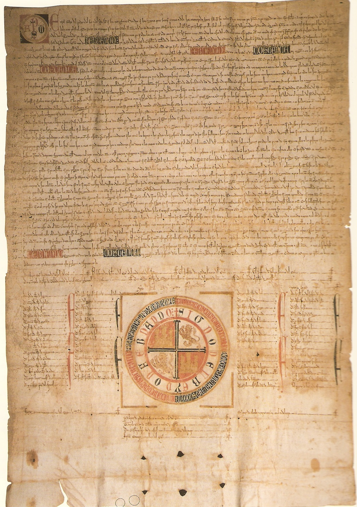 Privilegio rodado emitido por el rey Fernando IV de Castilla el día 13 de agosto de 1310 por el que confirma los privilegios que su abuelo, Alfonso X de Castilla, y su padre, Sancho IV de Castilla, concedieron al monasterio de San Clemente de Sevilla. Al mismo tiempo, Fernando IV concedió a dicho monasterio nuevas exenciones y franquezas. El documento se custodia en el monasterio de San Clemente de Sevilla, provincia de Sevilla (España).